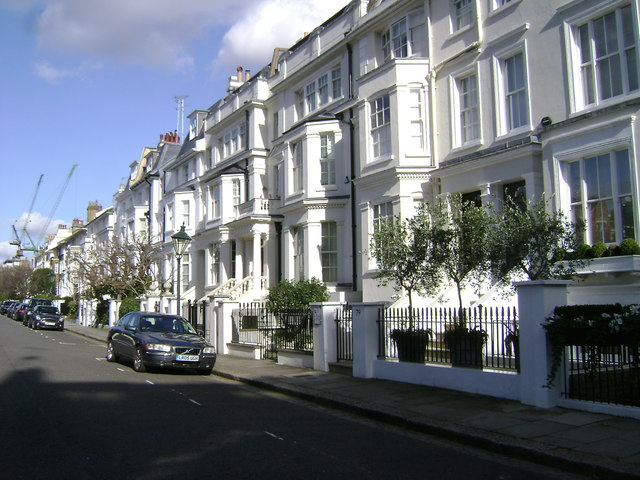 Victoria Road, Kensington.